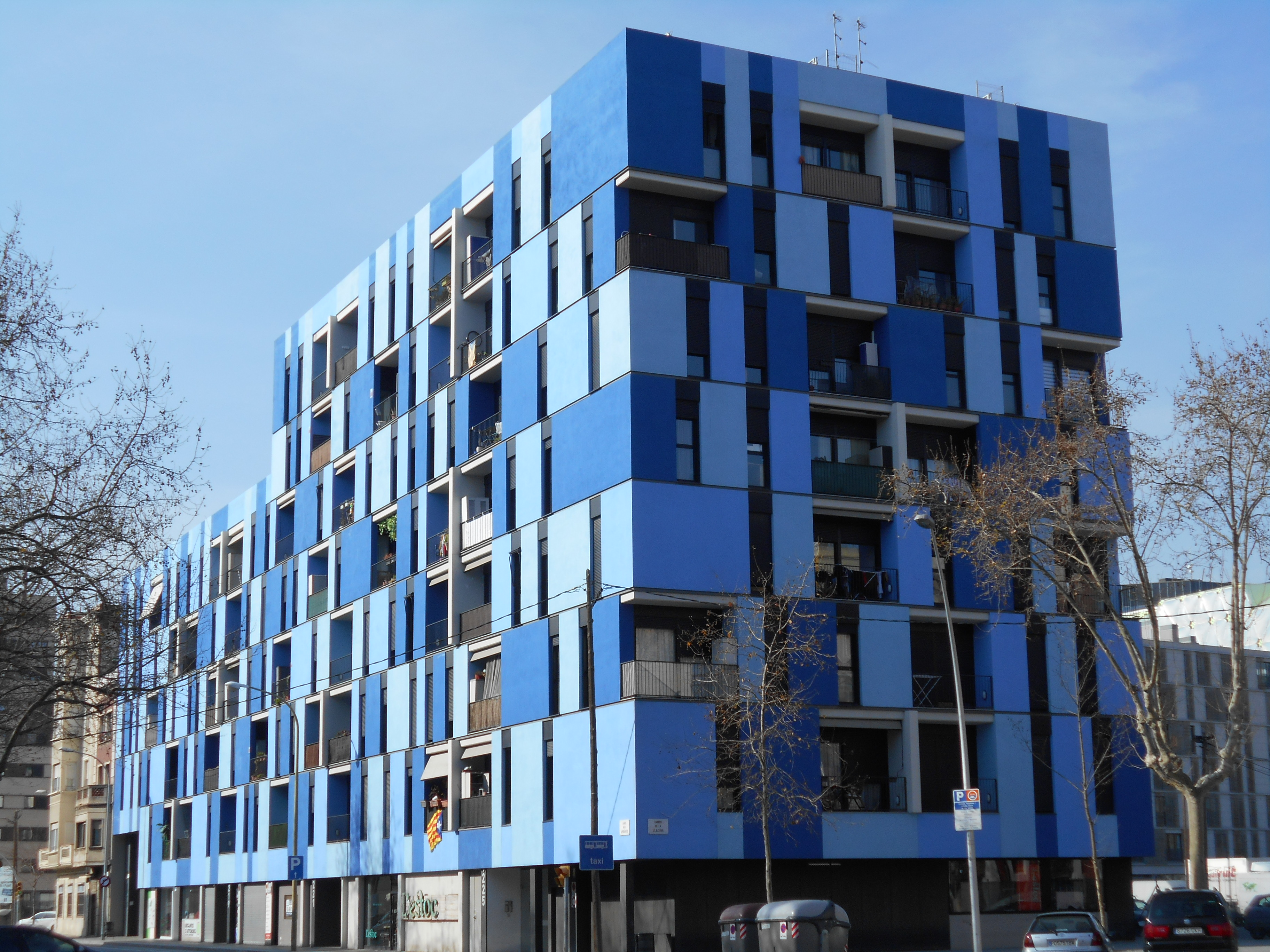 Edificio Blau (2009), de Antoni de Moragas, Eva Mercader Oliver y Susanna Itarte Rubió.